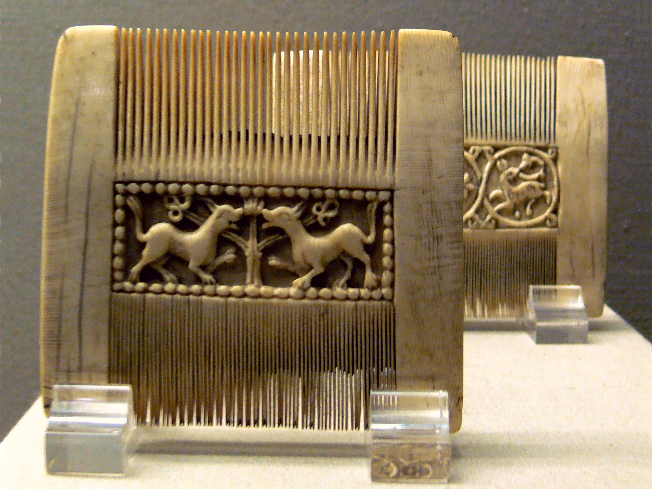 Diözesanmuseum Bamberg Liturgische Kämme aus Elfenbein, Mittelalter (einer Süditalien um 1100, der andere Italien 14 Jh.)